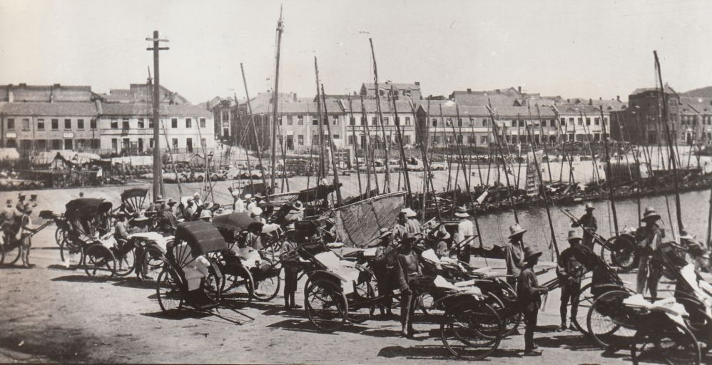 青岛小港及海关后街区旧影